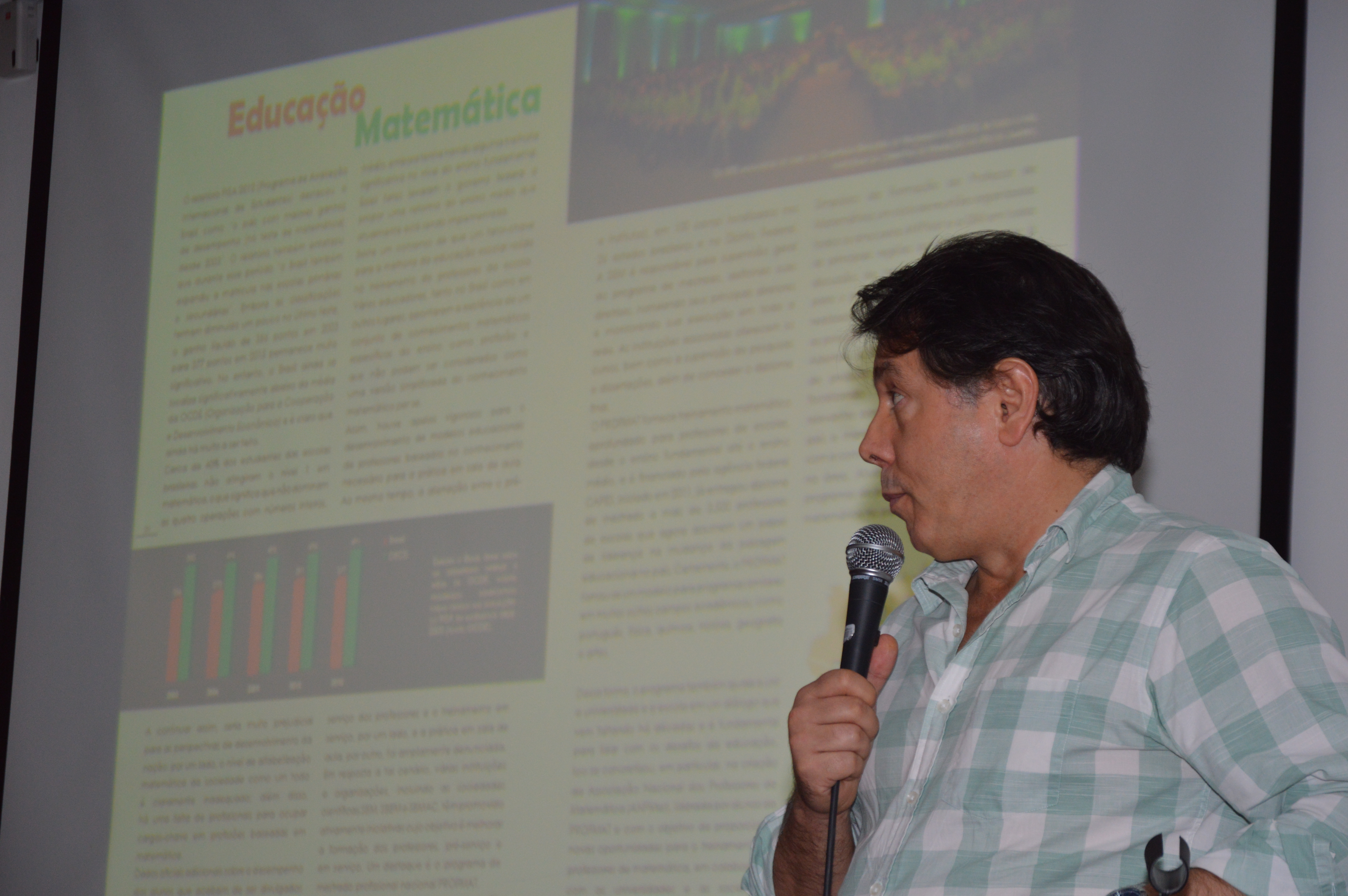 Marcelo Viana na Aula Magna IME-UFRGS dia 25 de abril de 2018 falando dos desafios da educação matemática no Brasil.